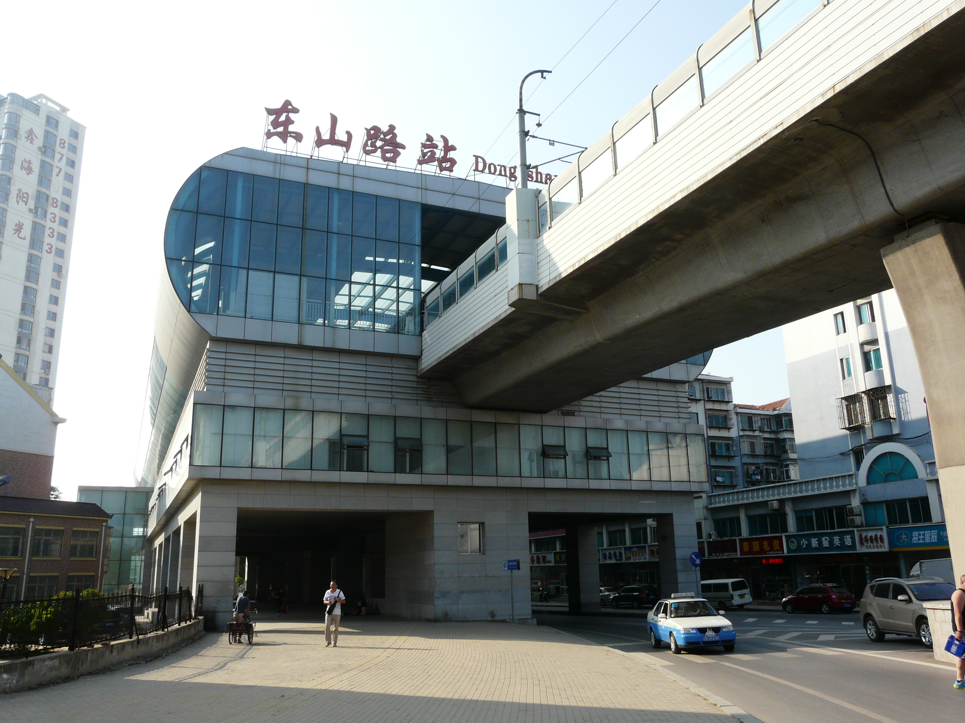 東山路駅